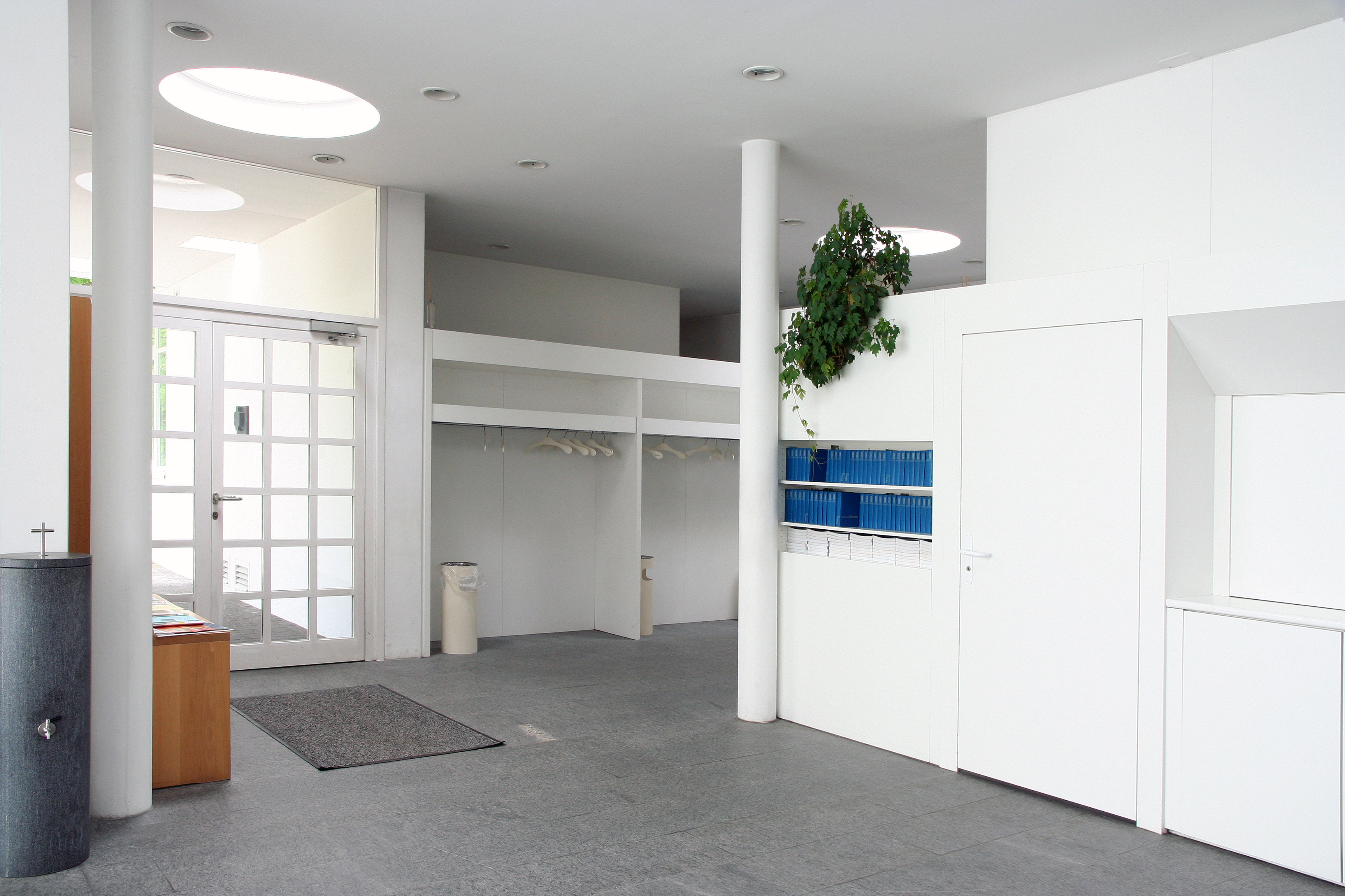 Römisch-katholische Kirche Heilig Chrüz Oberrieden ZH, Foyer